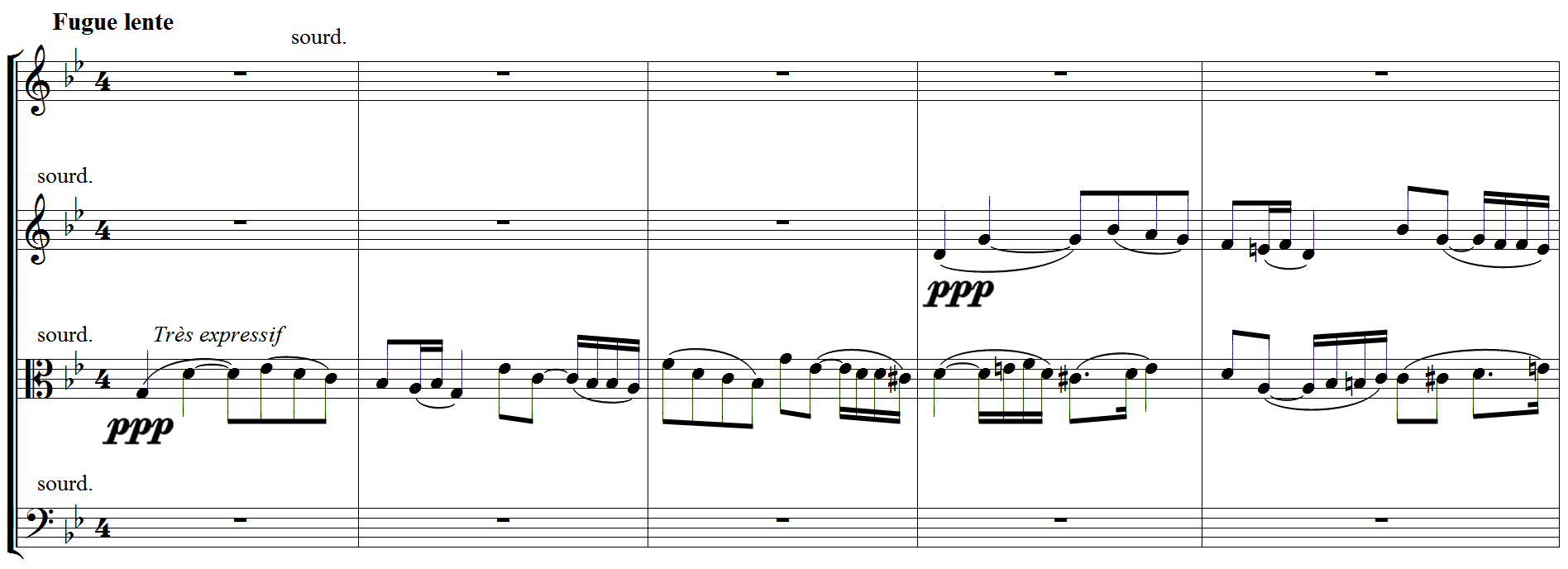 Joaquin Turina : Quintette pour piano & cordes, op.1, mes.1-5, thème cyclique